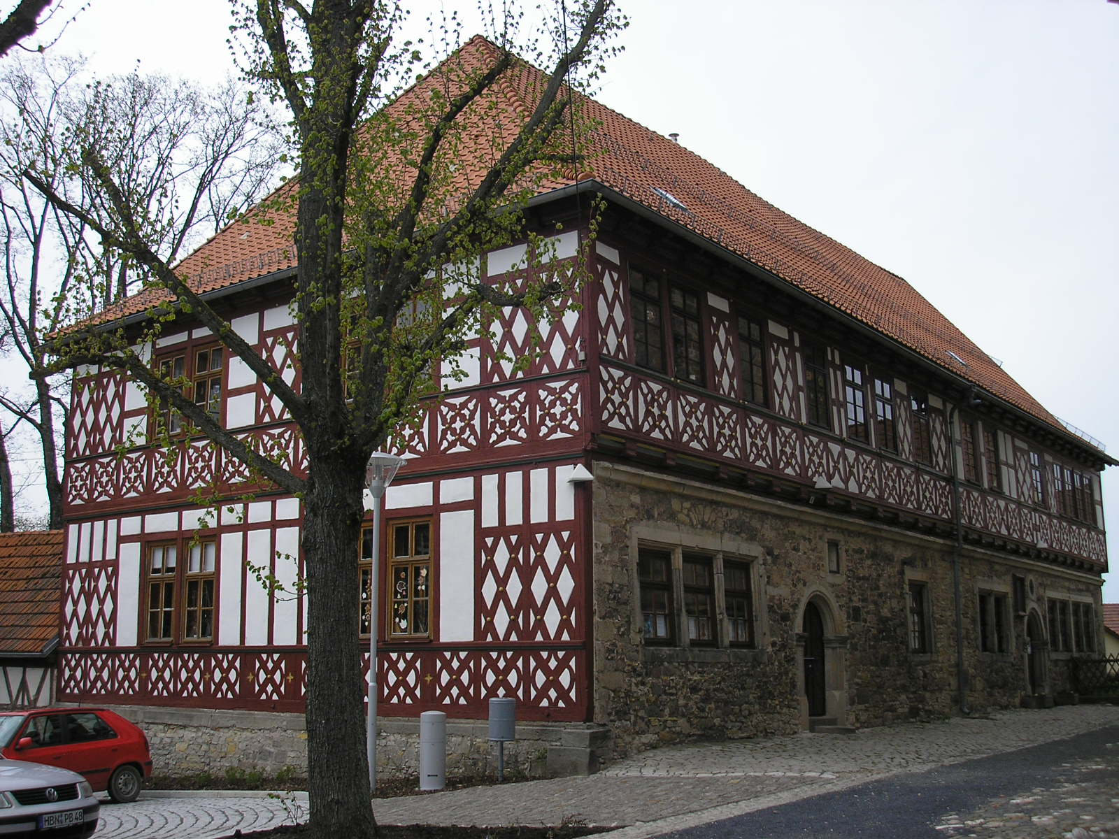 Das Pfarrhaus in Eisfeld (Thüringen)